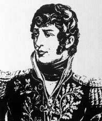 Général_Jean_Baptiste_Cervoni